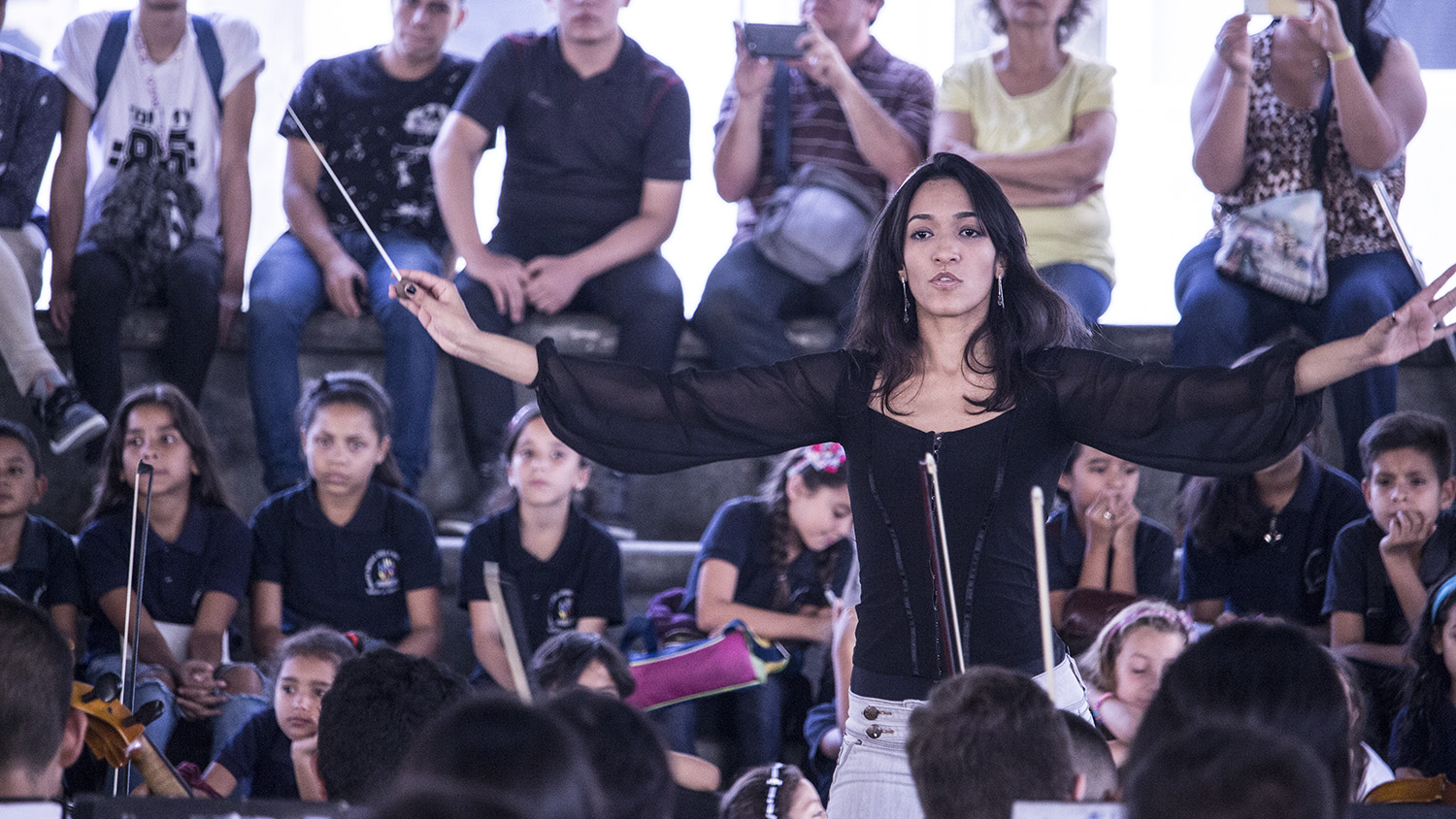 Directora de Orquesta